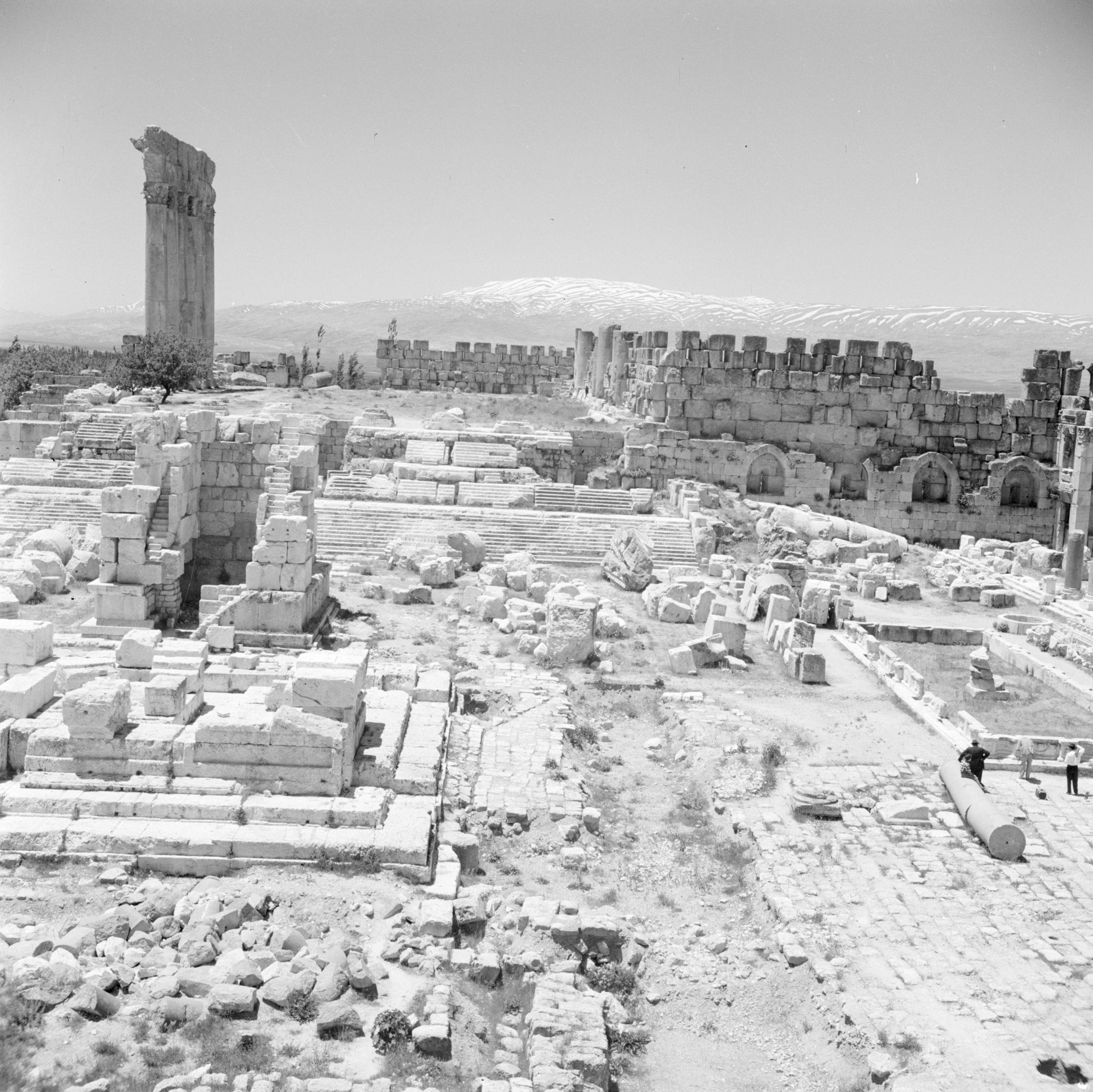 Collectie / Archief : Fotocollectie Van de Poll Reportage / Serie : Midden-Oosten 1950-1955: Libanon Beschrijving : Beeld van de ruïnes te Baalbek Annotatie : Op de achtergrond de resten van een Arabisch fort Datum : 1950 Locatie : Baalbek, Libanon Trefwoorden : forten, heiligdommen, ruïnes Fotograaf : Poll, Willem van de Auteursrechthebbende : Nationaal Archief Materiaalsoort : Negatief (zwart/wit) Nummer archiefinventaris : bekijk toegang 2.24.14.02 Bestanddeelnummer : 255-6473